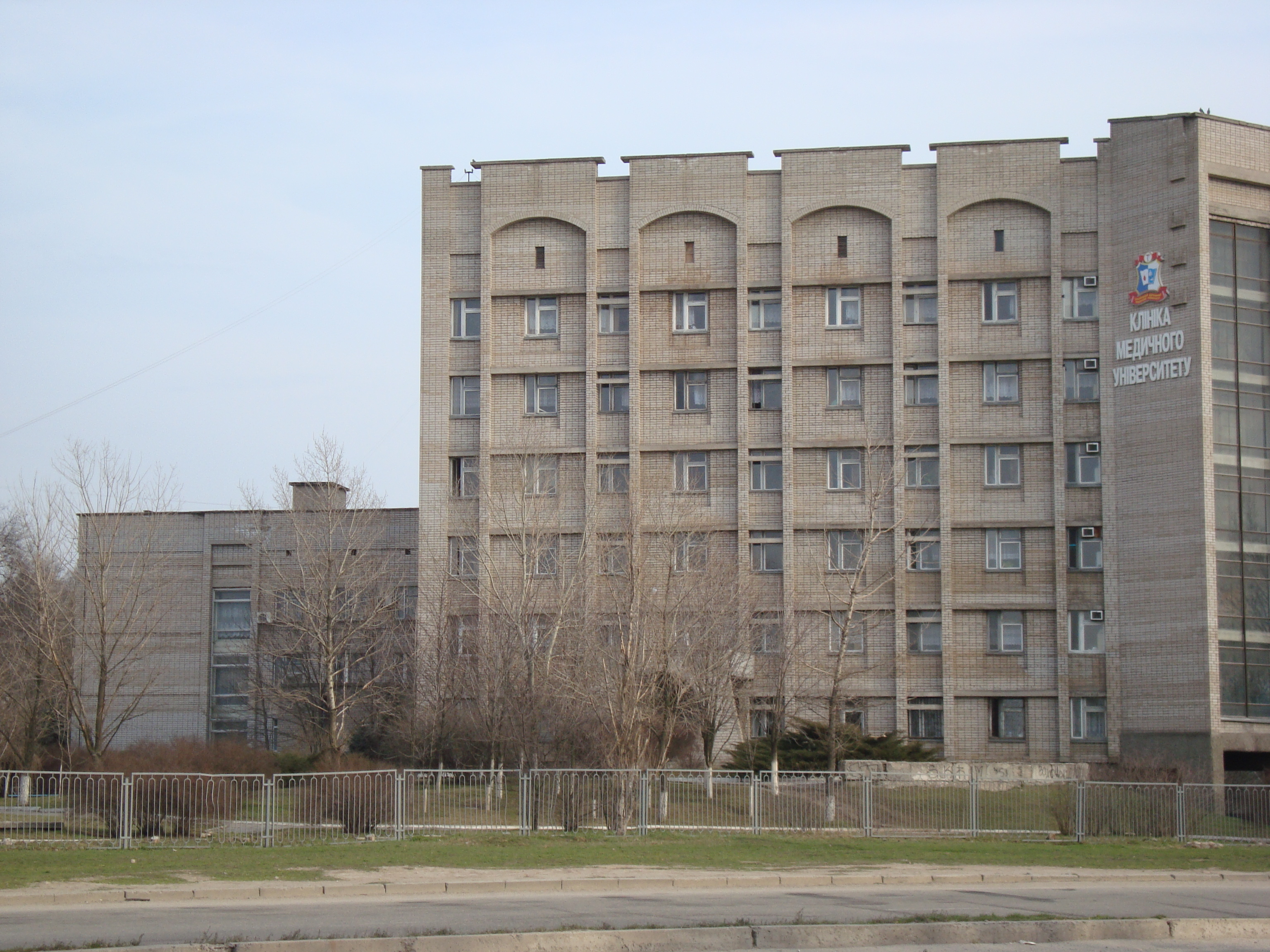 Клиника Запорожского медицинского университета